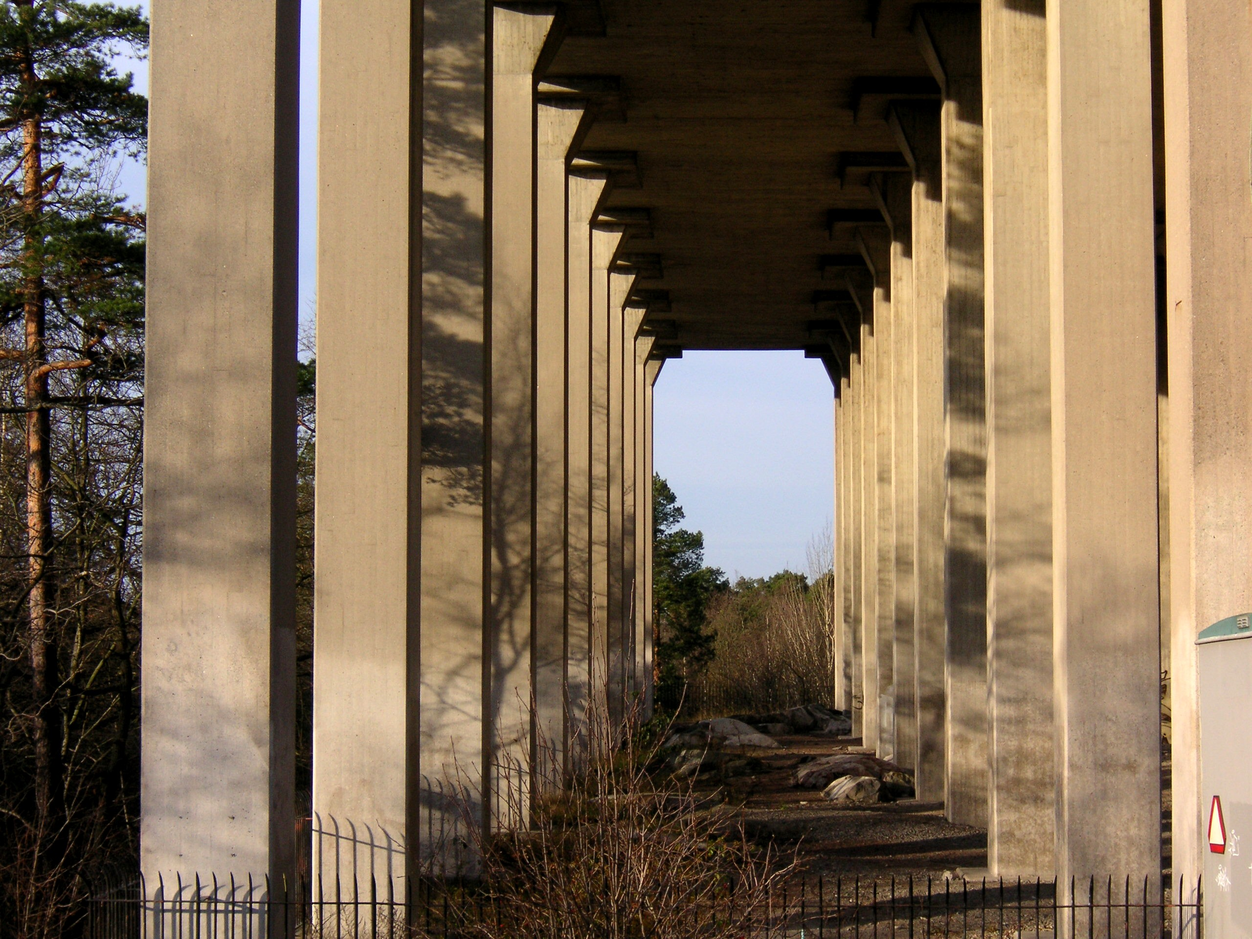 Djurgården i Stockholm, Lill-Jansskogen, Uggleviksresrevoaren av Paul Hedqvist